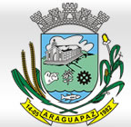 Brasão de Armas do município de Araguapaz, Goiás, Brasil.